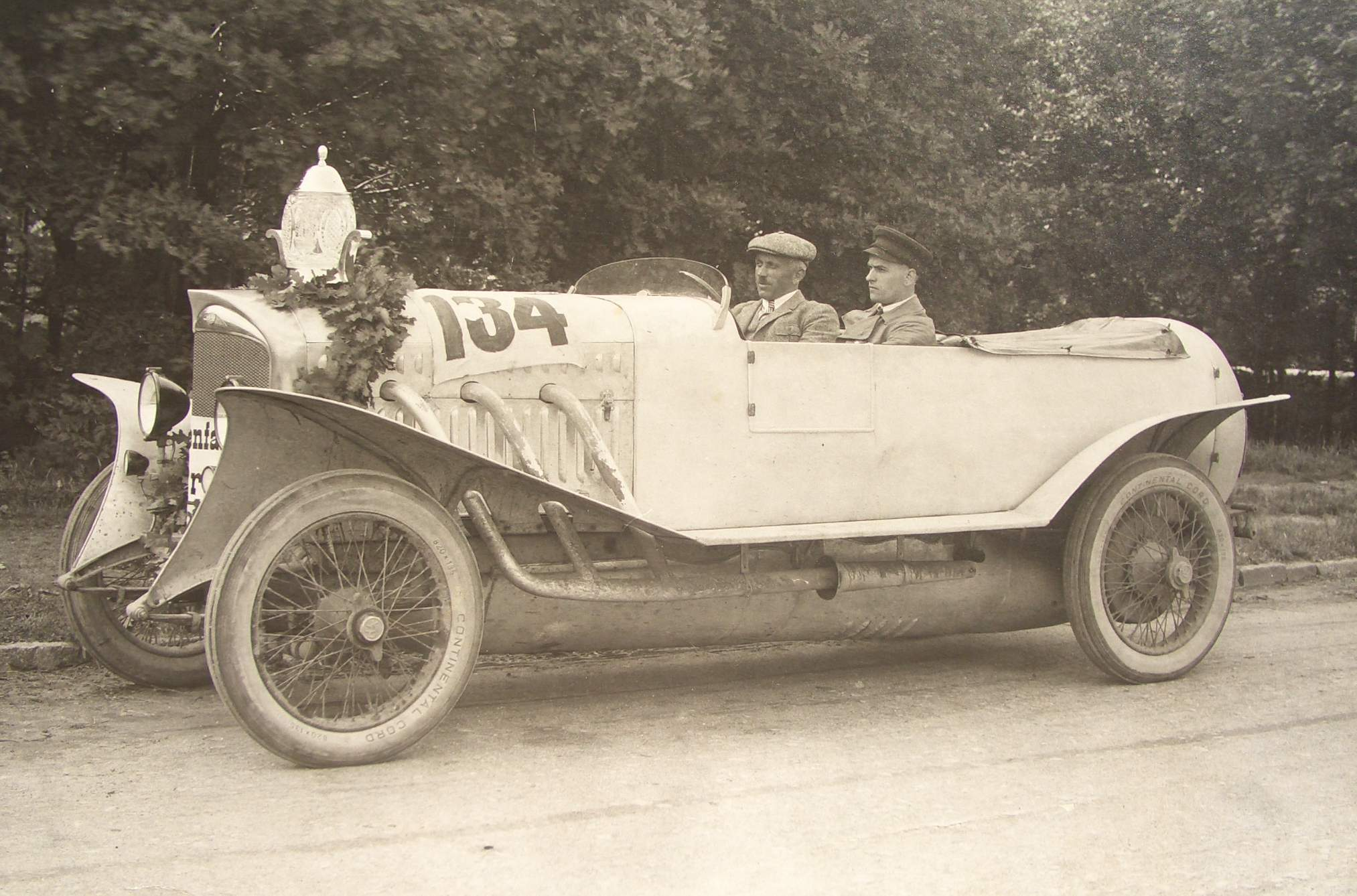 Bildbeschreibung:Sieger der Sachsenfahrt Herr Kaul auf Dux Quelle:Foto vom Fotograf überlassen Fotograf:unbekannt Datum:1924